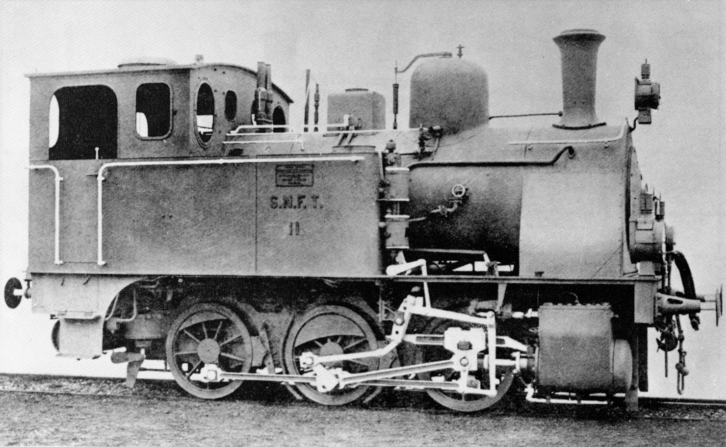 Foto di fabbrica della locomotiva a vapore 11 della Società Nazionale Ferrovie e Tramvie (SNFT).